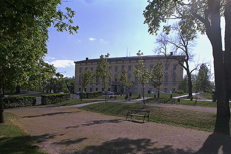 Carolina Rediviva i bakgrunden. Motiv: Uppsala Nyckelord: Byggnadsminnen:Statl, Riksintressen Kategori: StadsmiljöCarolina Rediviva i bakgrunden.